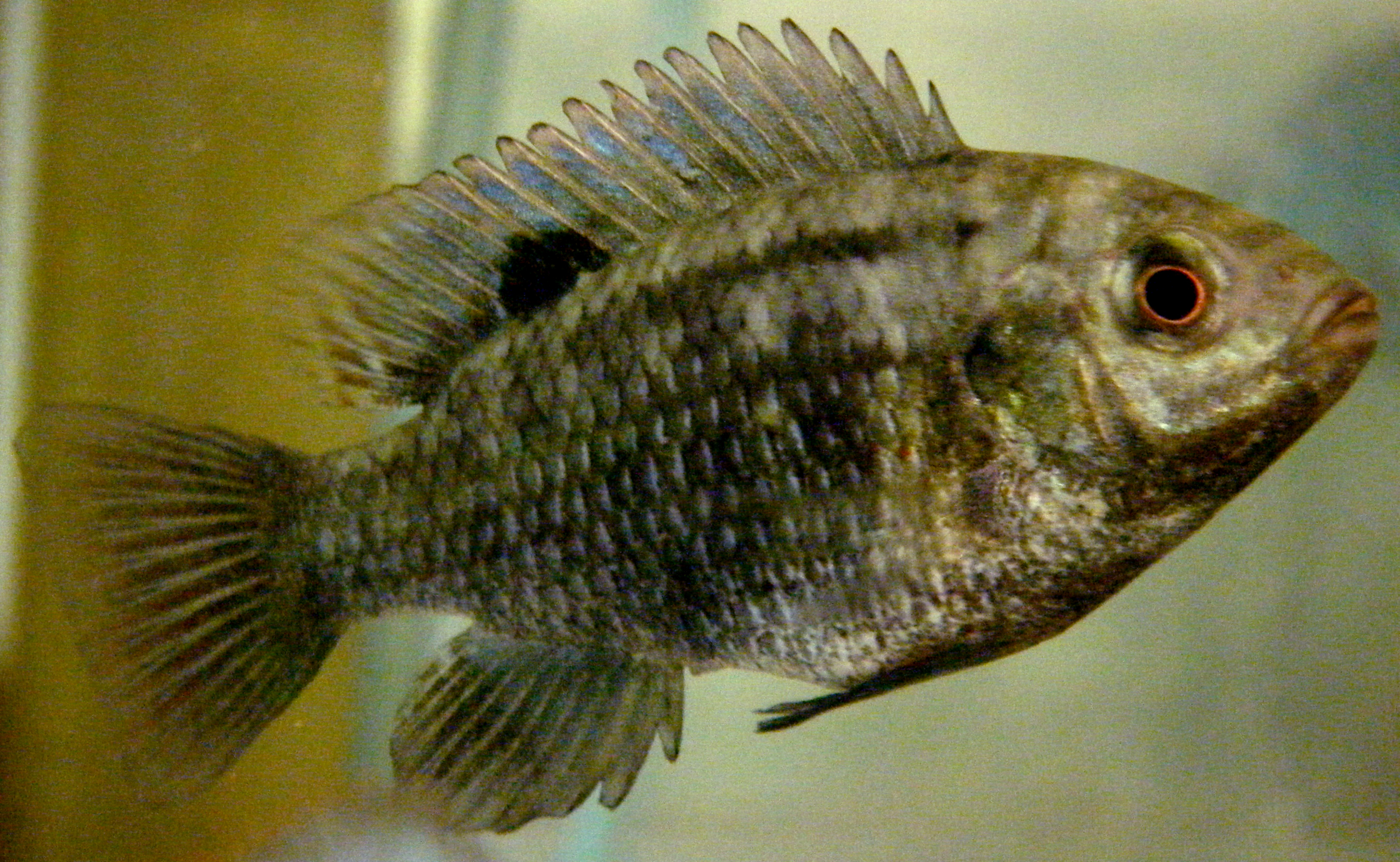 Tilapia sparrmanii, from Lake Chilingali